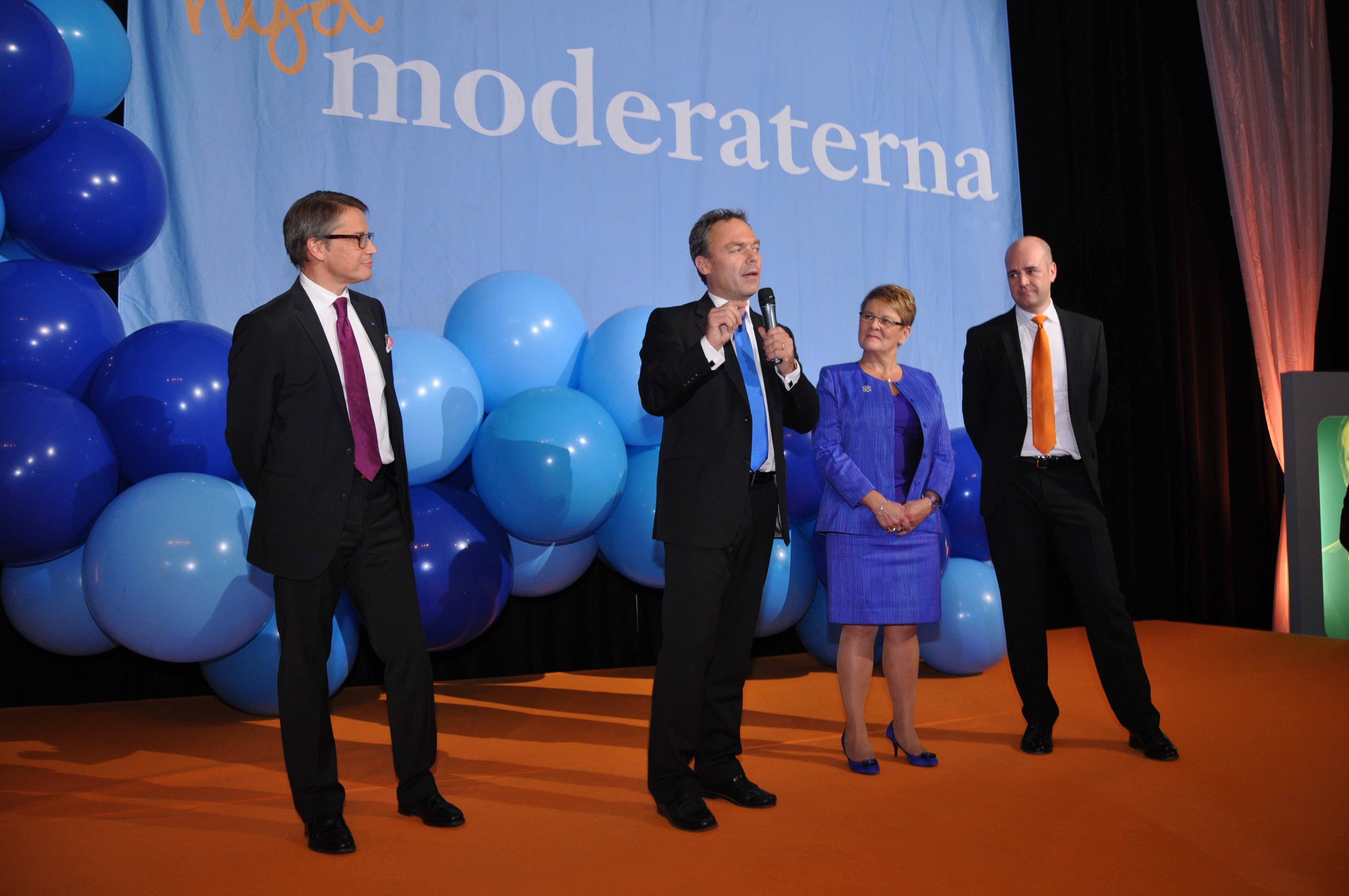 Göran Hägglund, Jan Björklund, Maud Olofsson, Fredrik Reinfeldt, på Moderaternas valvaka 2010